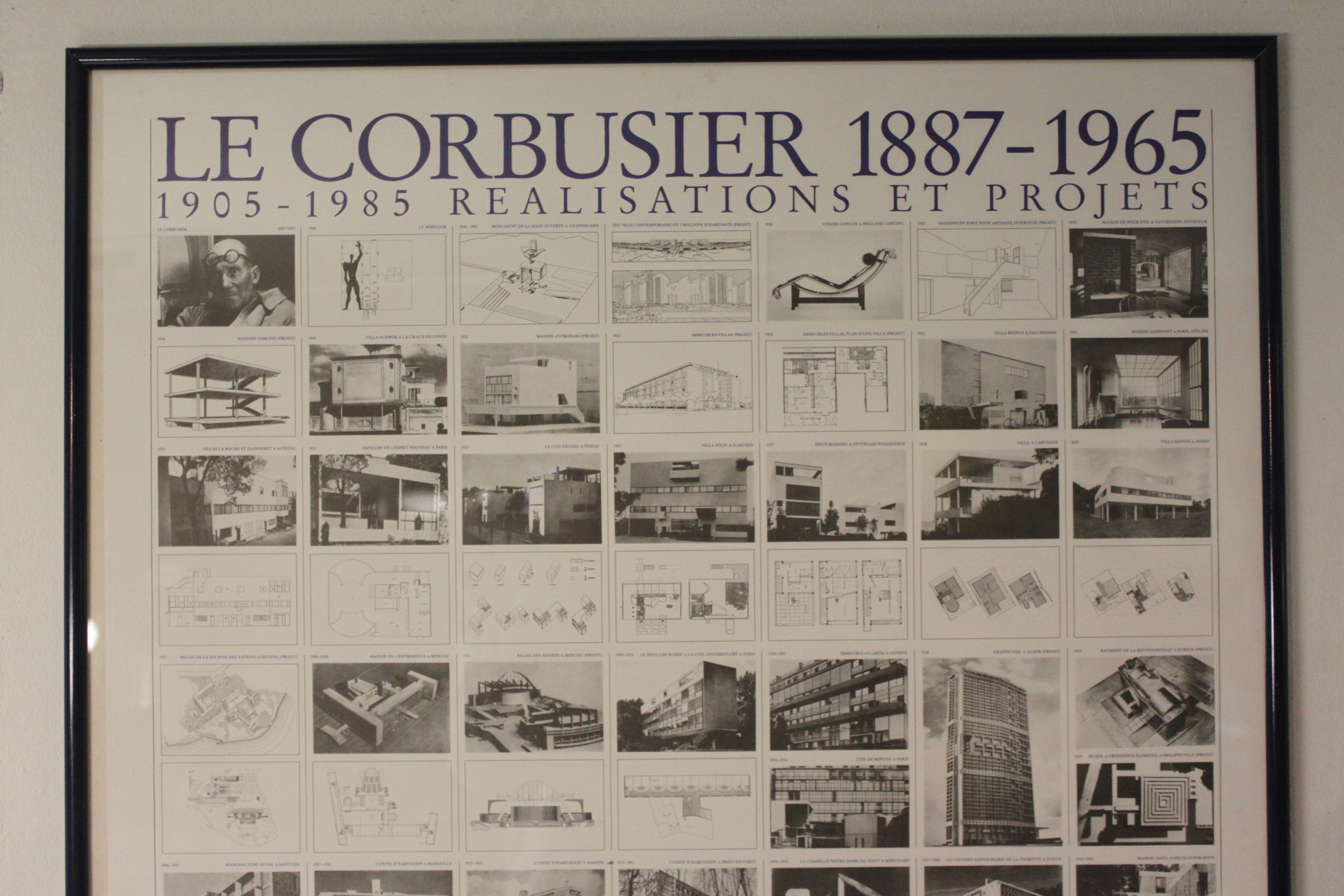 LE CORBUSIER 1887-1965 Kunstplakat Detailausschnitt